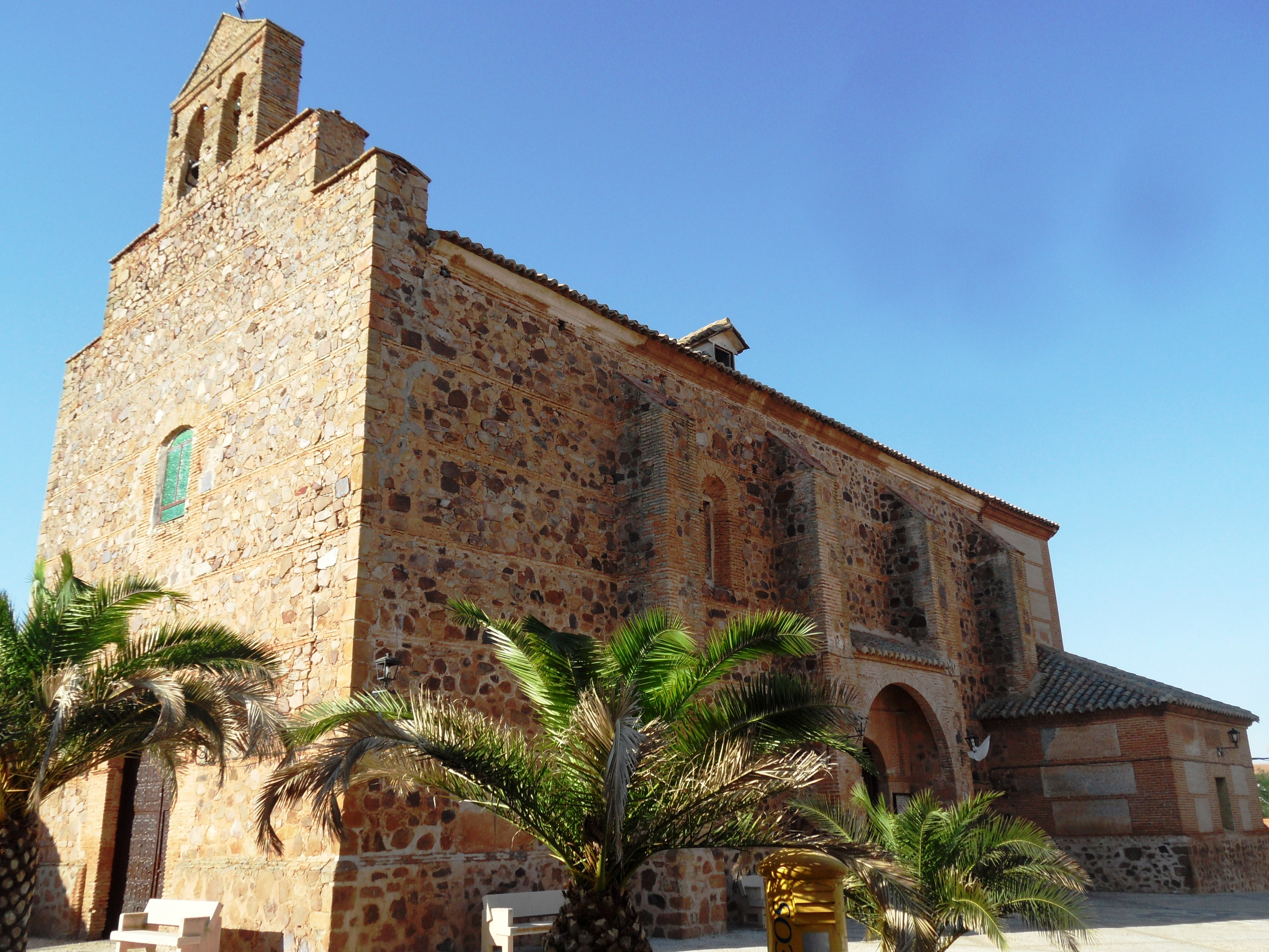 Iglesia de San Bartolomé de Valenzuela de Calatrava.